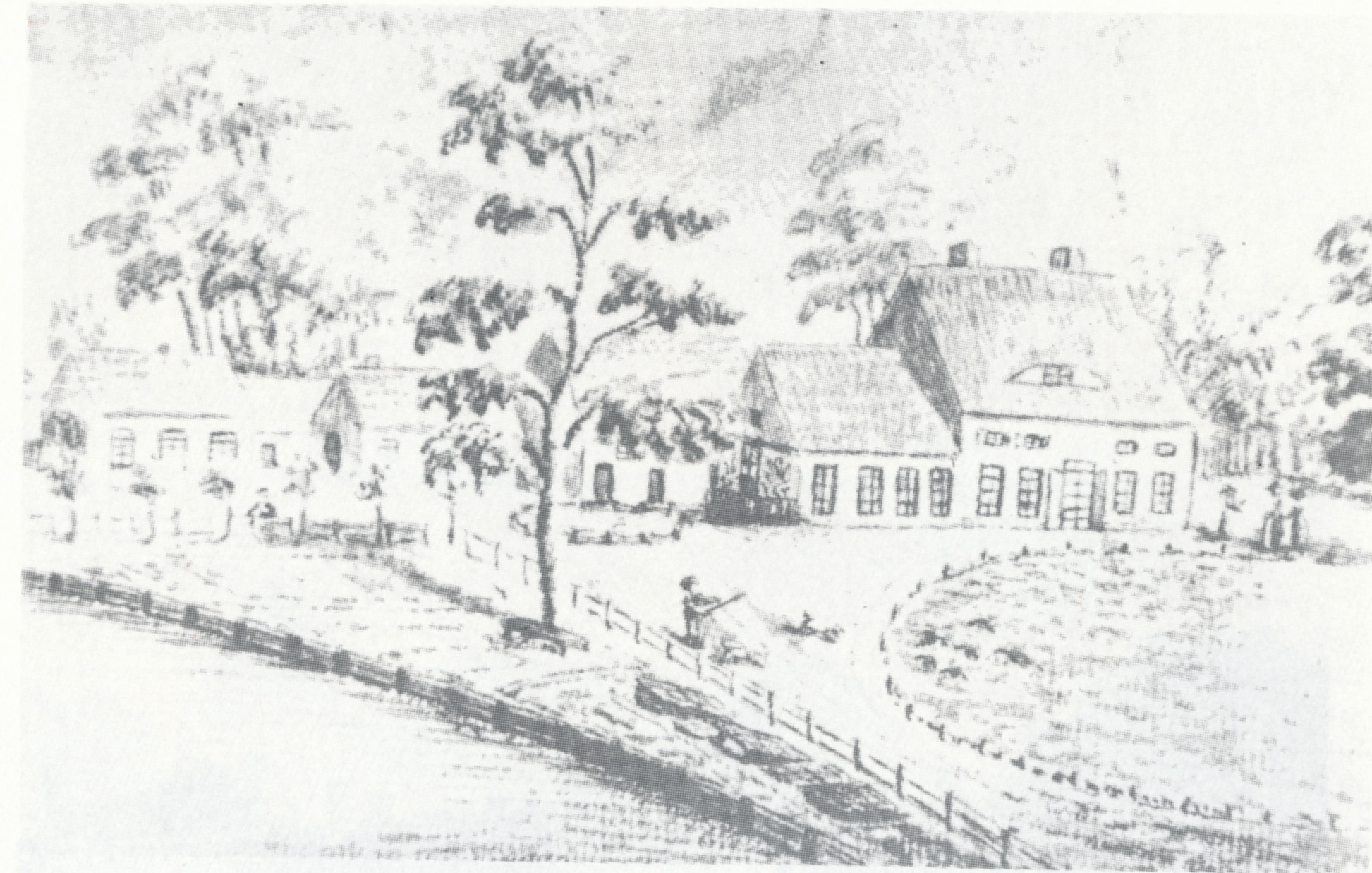 Herrenhaus der Familie von Puttkamer zu Treblin (Aquarell von 1820) Datum: 1820 Urheber: unbekannt Quelle: Ellinor von Puttkamer (Bearbeiterin): Geschichte des Geschlechts v. Puttkamer (= Deutsches Familienarchiv, Band 83–85). 2. Auflage, Degener, Neustadt an der Aisch 1984, ISBN 3-7686-5064-2, S. 815